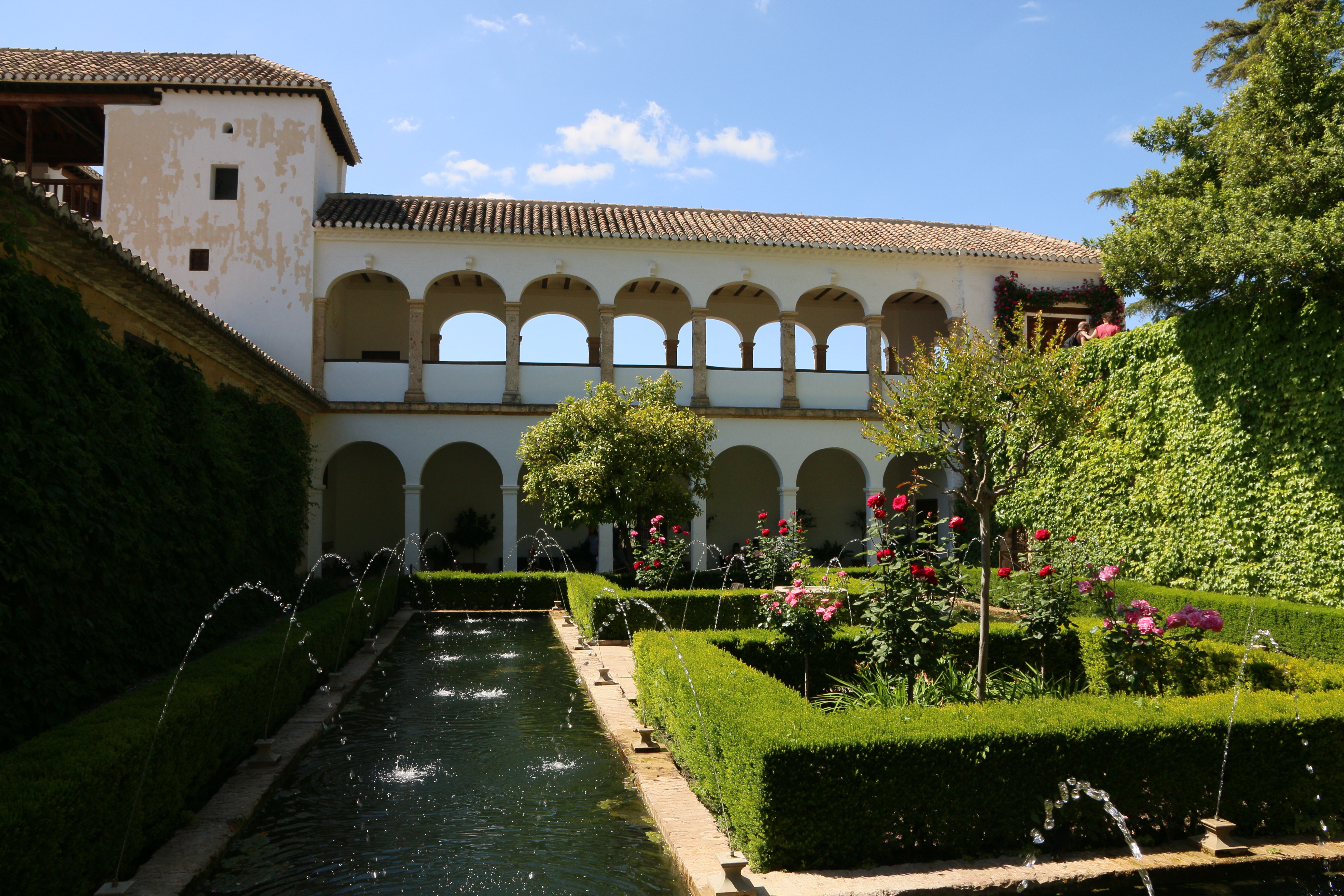 generalife in granada in spain 2016